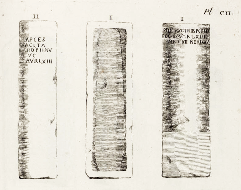 Dessins en 1759 par Anne Claude de Caylus, comte de Caylus, des milliaires CIL 17-02, 489 (n° I - les deux de droite) et CIL 17-02, 488 (n° II - celui de gauche). Ce dernier est disparu depuis.